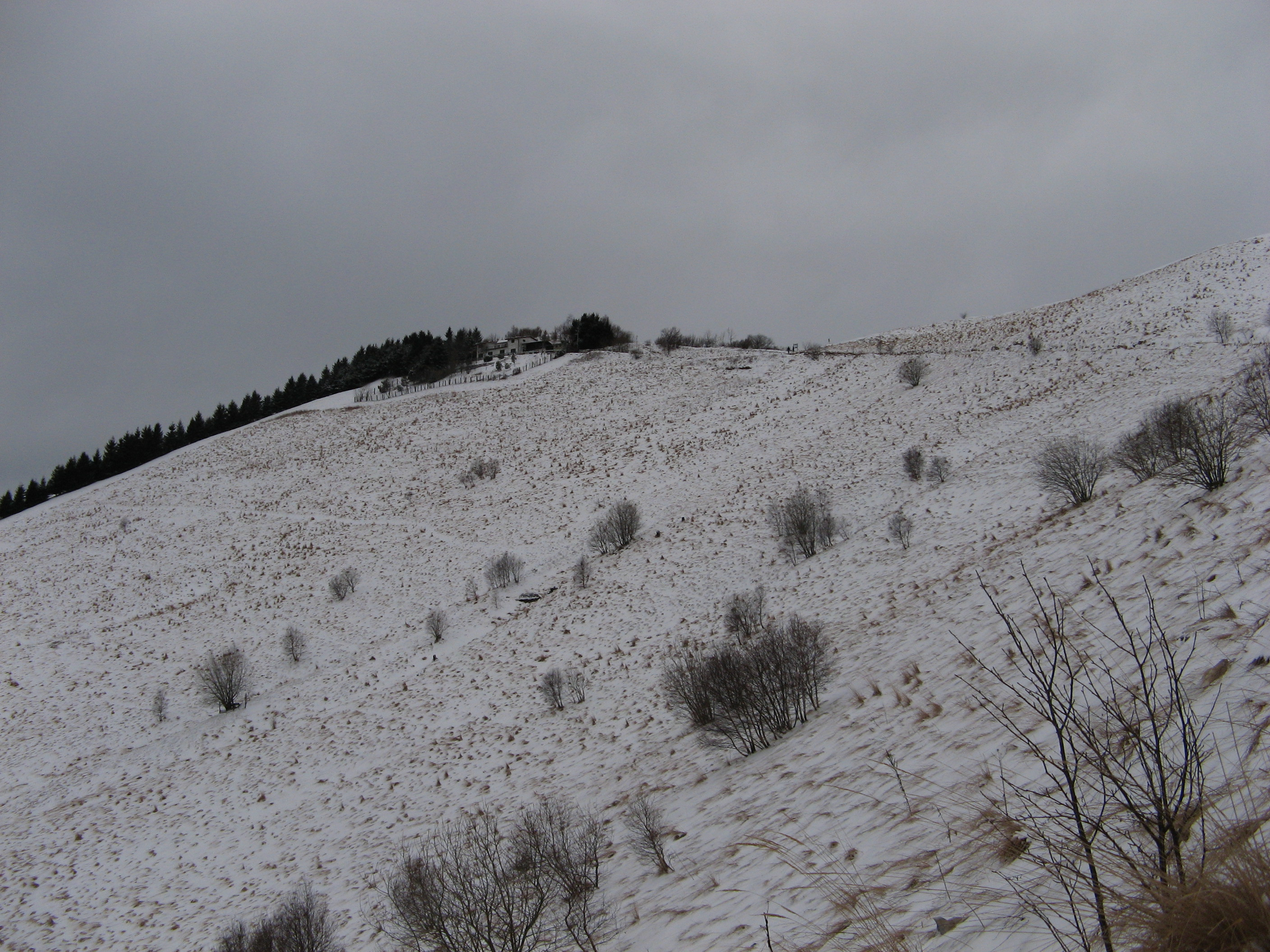 Mark alba